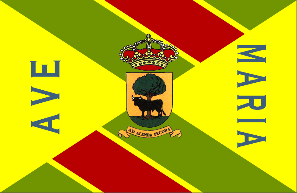 Bandera de Buitrago del Lozoya, en Madrid (España)